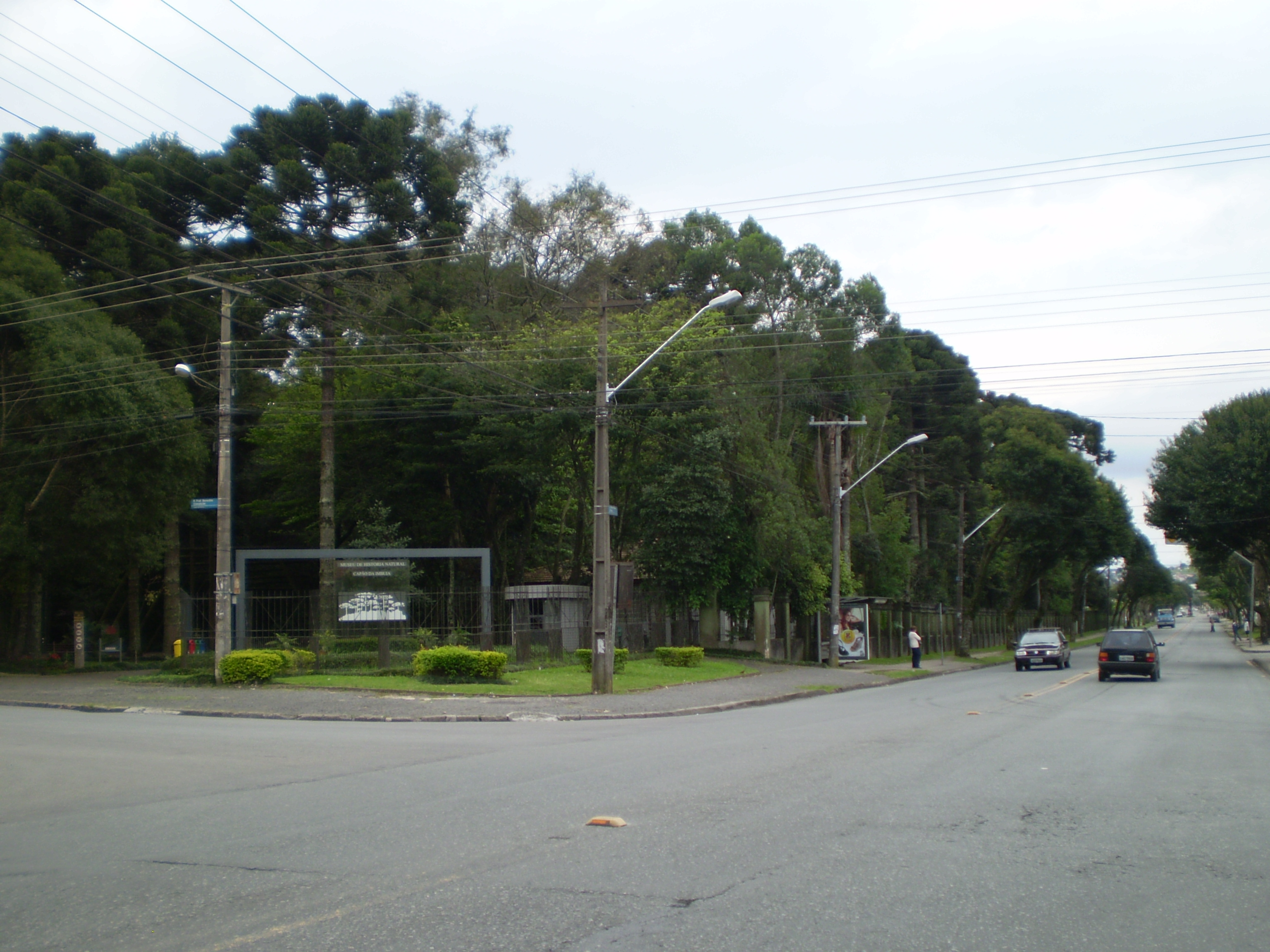 Rua Nivaldo Braga - Museu História Natural